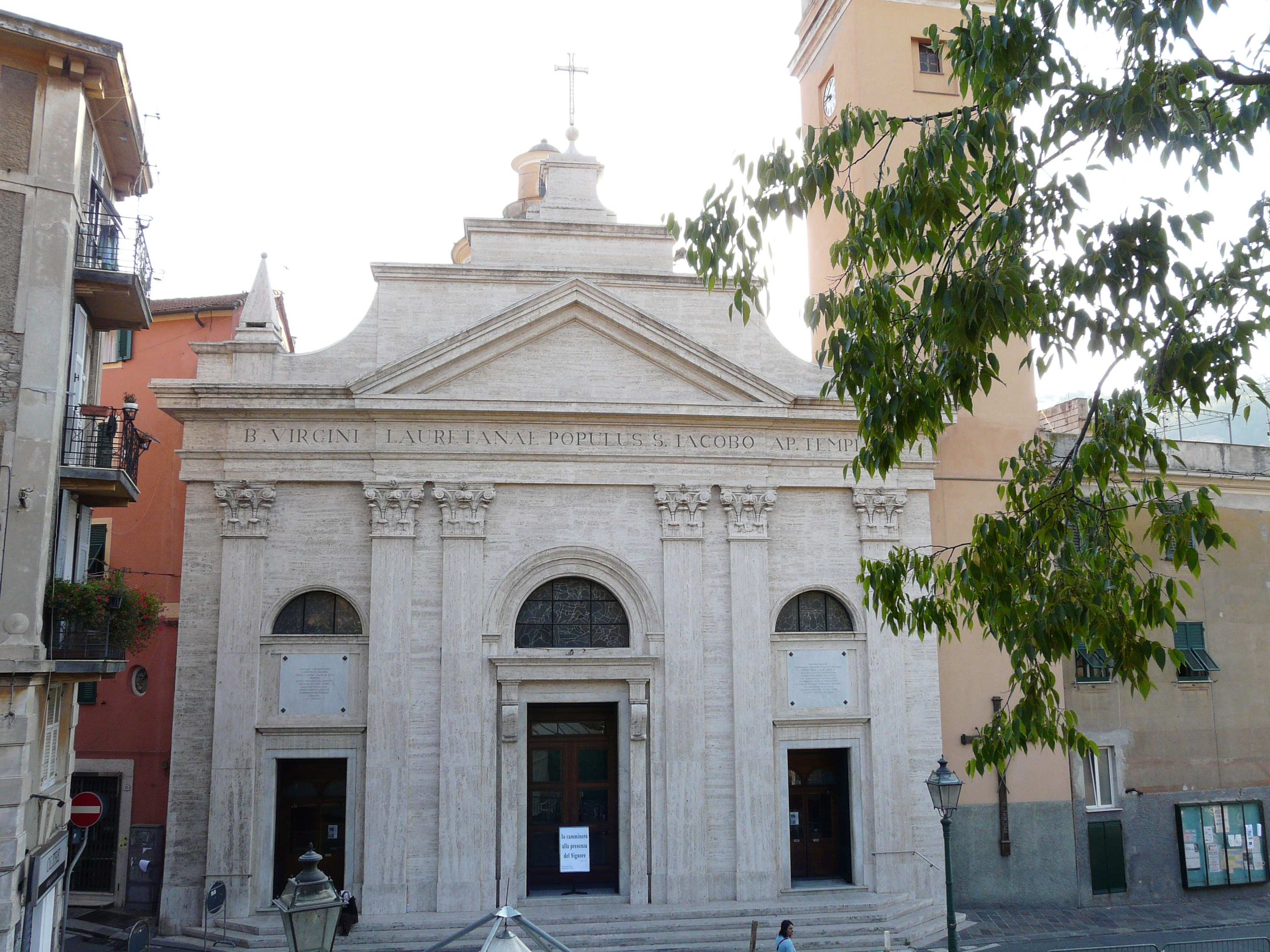 Chiesa di San Giacomo, Pontedecimo, Genova, Liguria, Italia